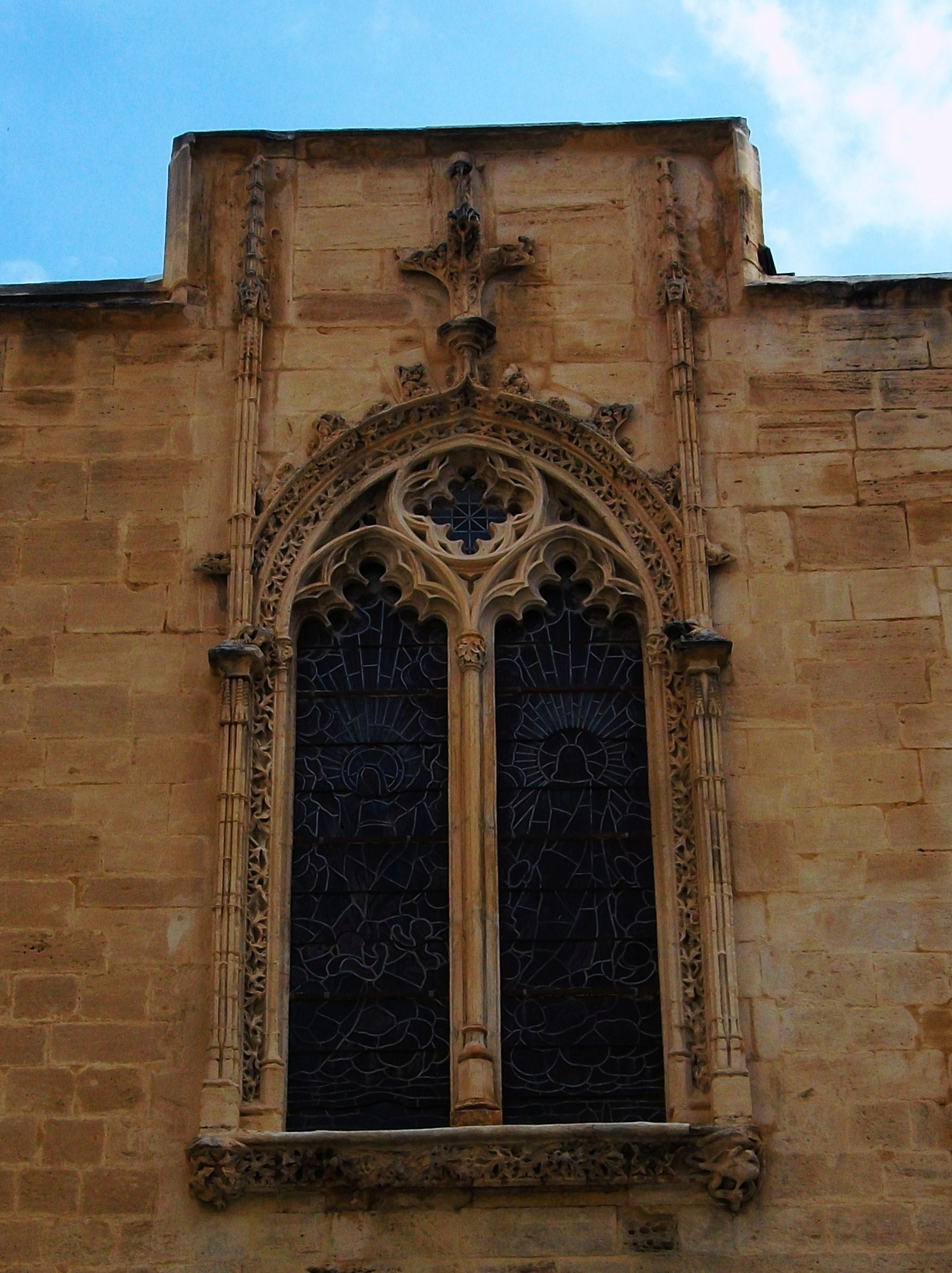 Finestra que hi ha a la part nord del creuer corresponent a l'antiga sala capitular de la catedral d'Oriola.